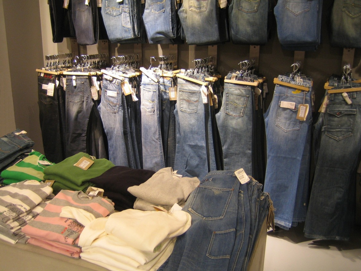 Konfektionskleidung. Jeans und Pullover.